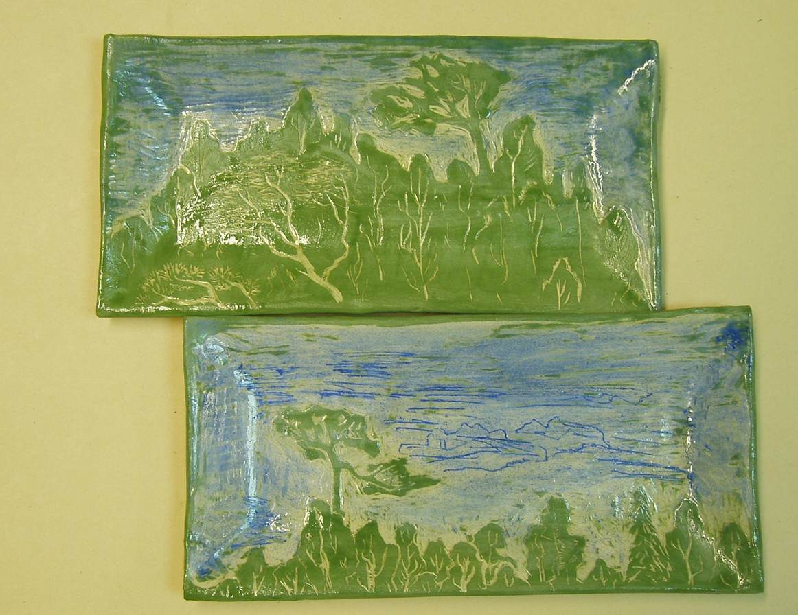 Rohelise pigmendiga värvitud angoob keraamilisel anumal. Kaetud läbipaistva glasuuriga. Sinine taevas saavutatud sinist pigmenti kasutades.